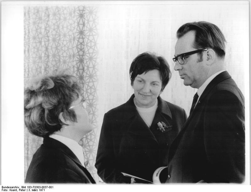 Zentralbild Koard 3.3.71-wa Berlin: Aus Anlaß des Internationalen Frauentages und in Vorbereitung des VIII. Parteitages fand am 3.3.71 im "Haus der Frau" eine Zusammenkunft der Arbeitsgruppe Komplementäre, Handwerker und Gewerbetreibende des Nationalrats der Nationalen Front und des Bundesvorstandes des DFD statt. In der Pause unterhielten sich v.r.n.l.: Alexander Mallickh, Mitglied des Präsidiums und des Sekretariats des Nationalrats, Ilse Thiele, Vorsitzende des DFD und Elisabeth Wolf (CDU), Mitglied des Nationalsrats